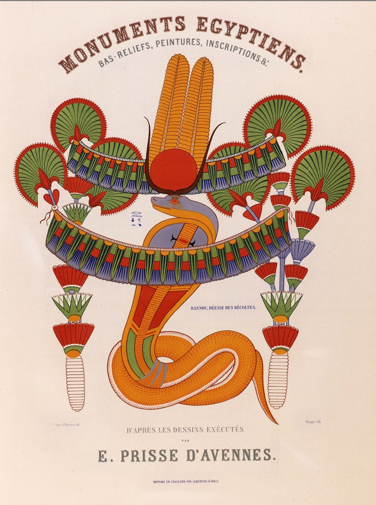 Frontispice de Monuments Égyptiens, bas-reliefs, peintures, inscriptions etc... dessins d' Émile Prisse d'Avesnes - Publié en 1847 par Firmin-Didot, Paris.